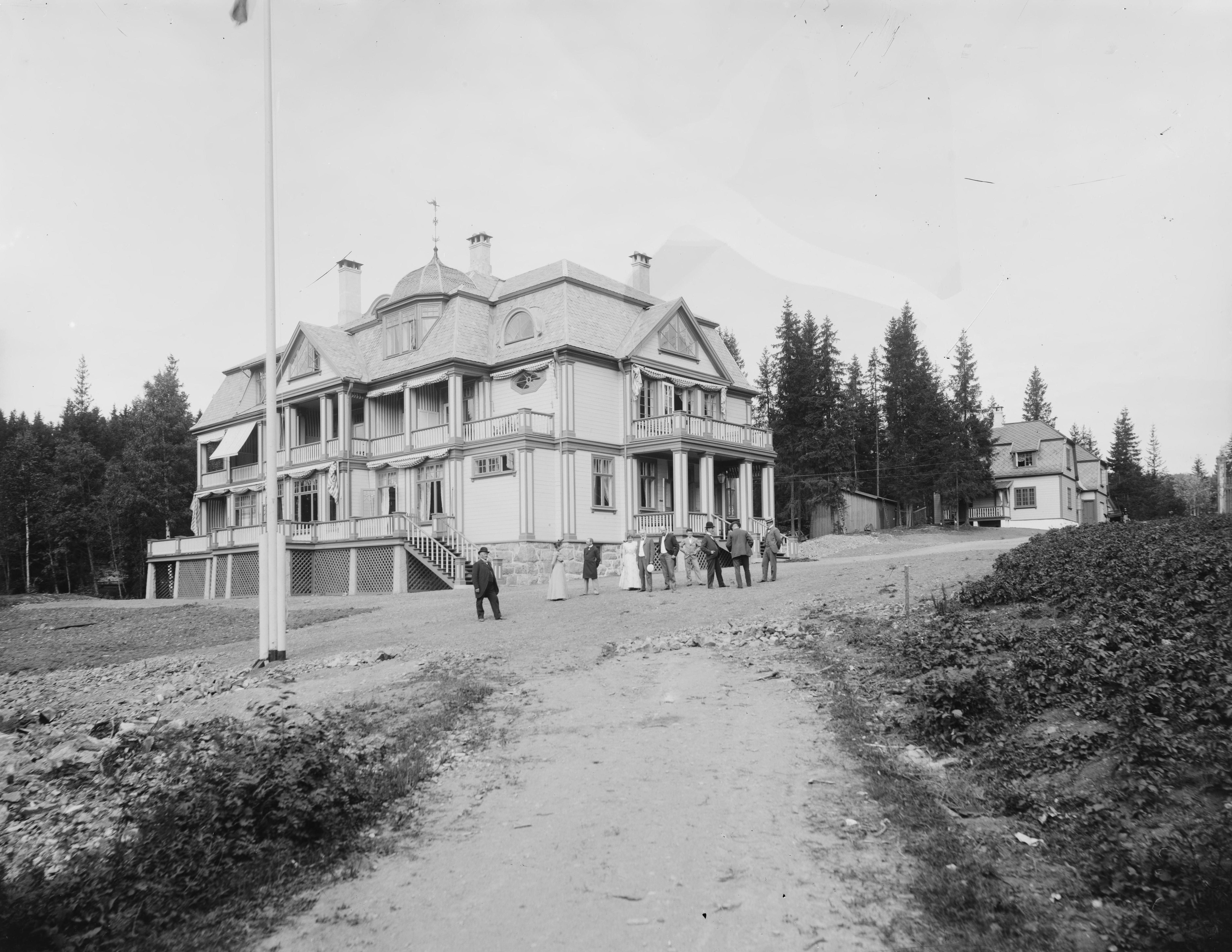 Påskrift konvolutt: B-46. V.Aker. Frognerseterveien 54. [Riksantikvaren] Sted: Slemdal,Vestre Aker Kommune: Oslo Fylke: Oslo Tagger: Fosheim pensionat pensjonat fasade trebygning